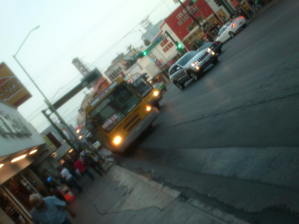 Ruta 10 de Transregio